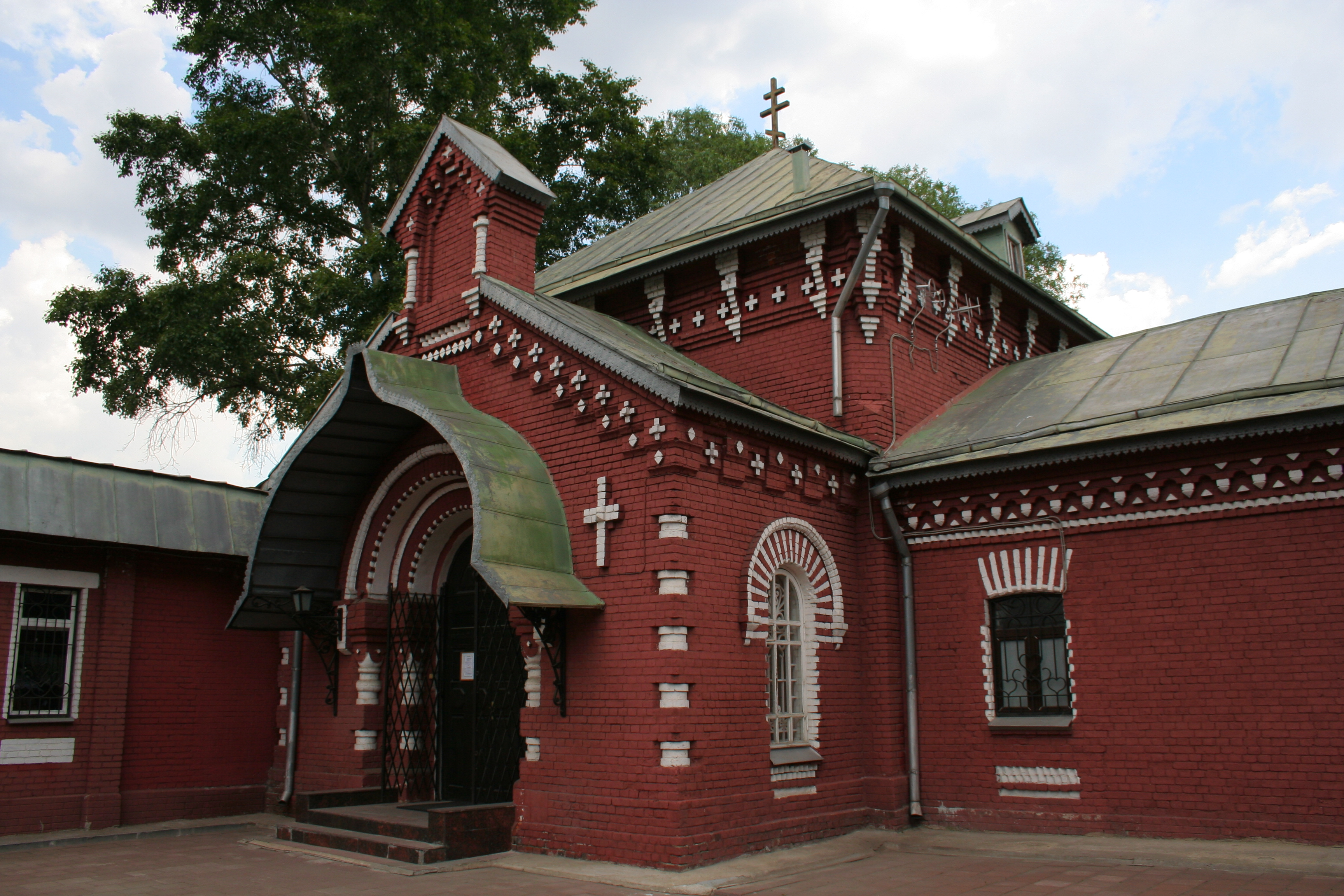 Ehemalige Kirche des Johannes von Rila beim Ersten Psychiatrischen Krankehnaus, Moskau.